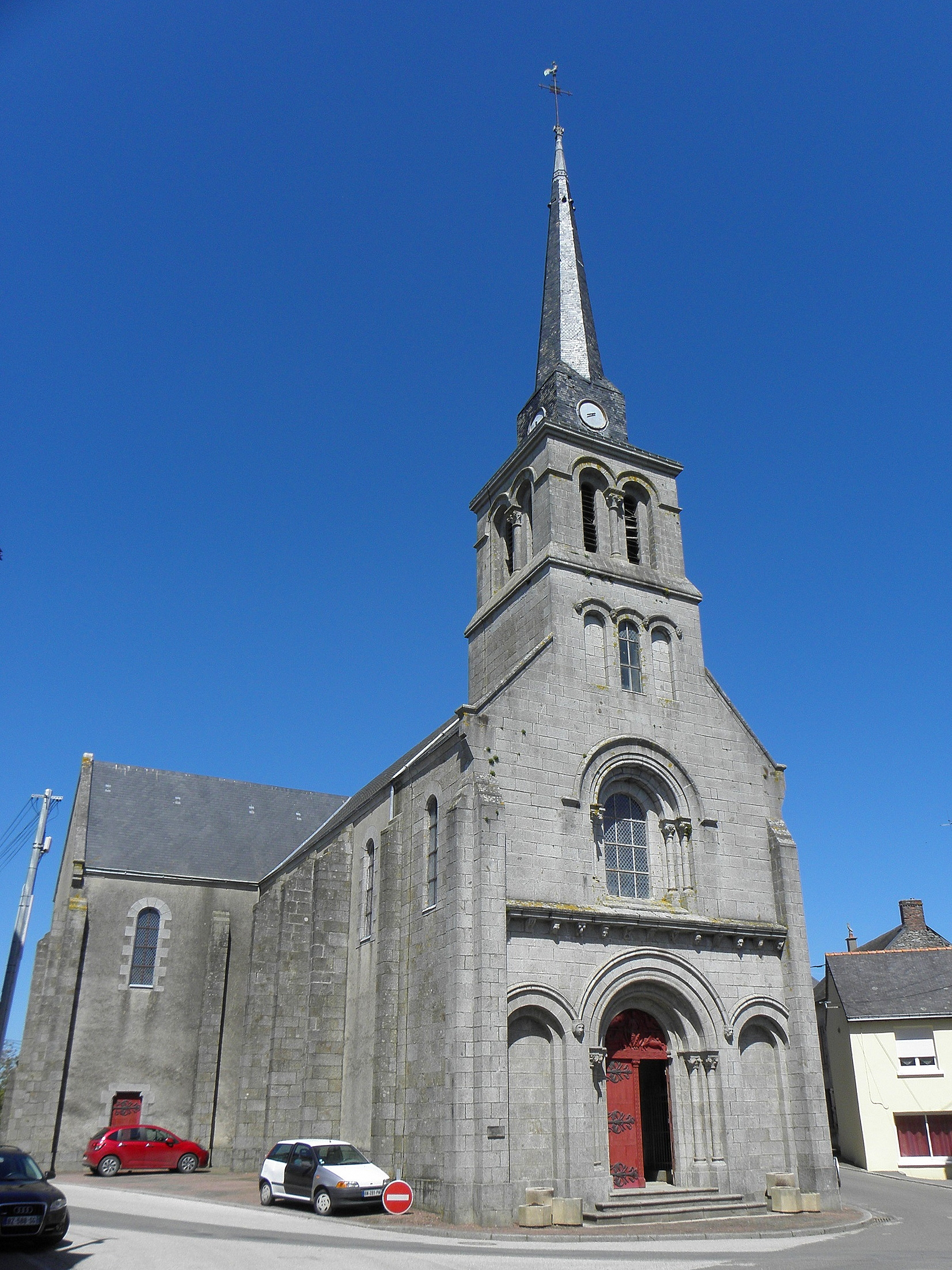 Église Saint-Hippolyte de Sacé (53).